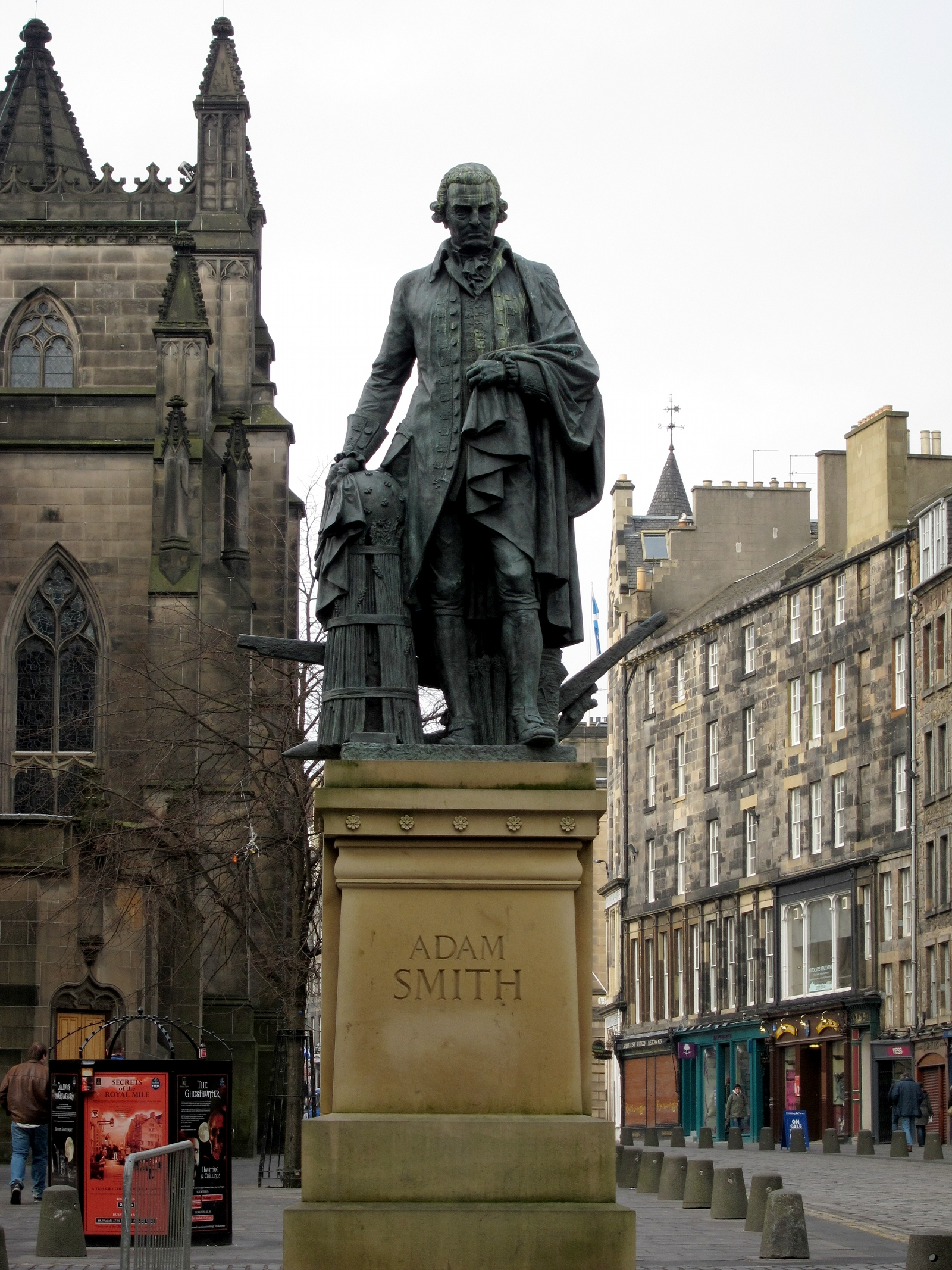 Statue d'Adam Smith à Edinburgh (Ecosse).